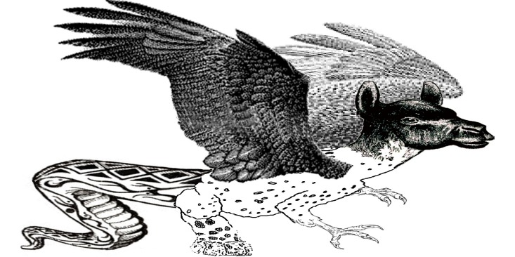 El Amaru era una bestia fabulosa con cabeza de guanaco, alas y garras de gavilán, patas de otorongo en un cuerpo de sapo, cubierto de escamas, que terminaba en una cola de anaconda.